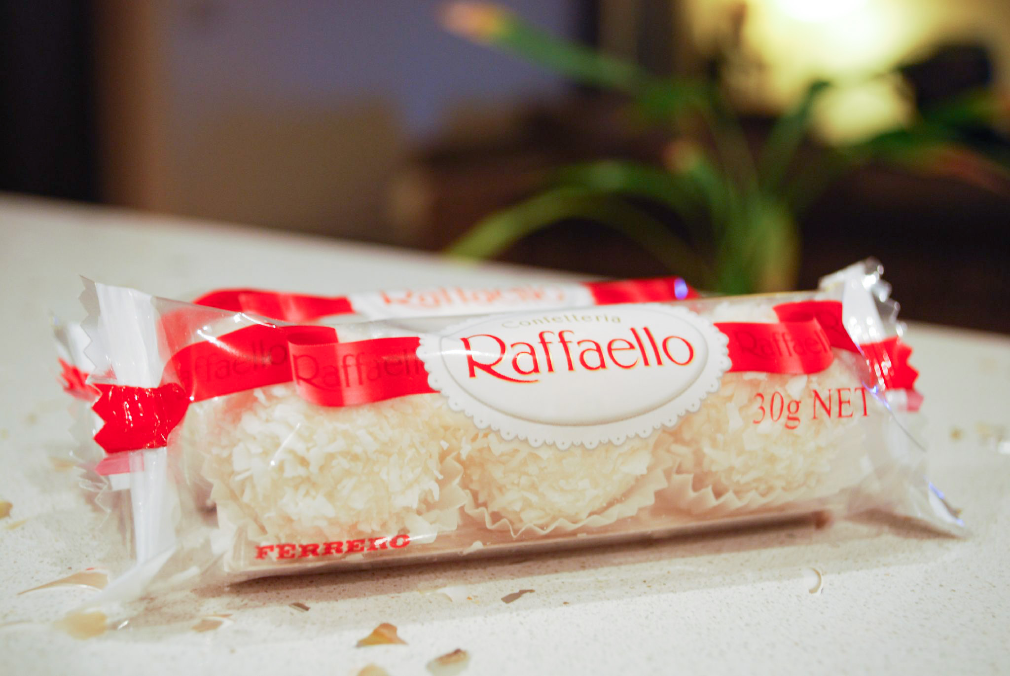 Raffaello in Verpackung